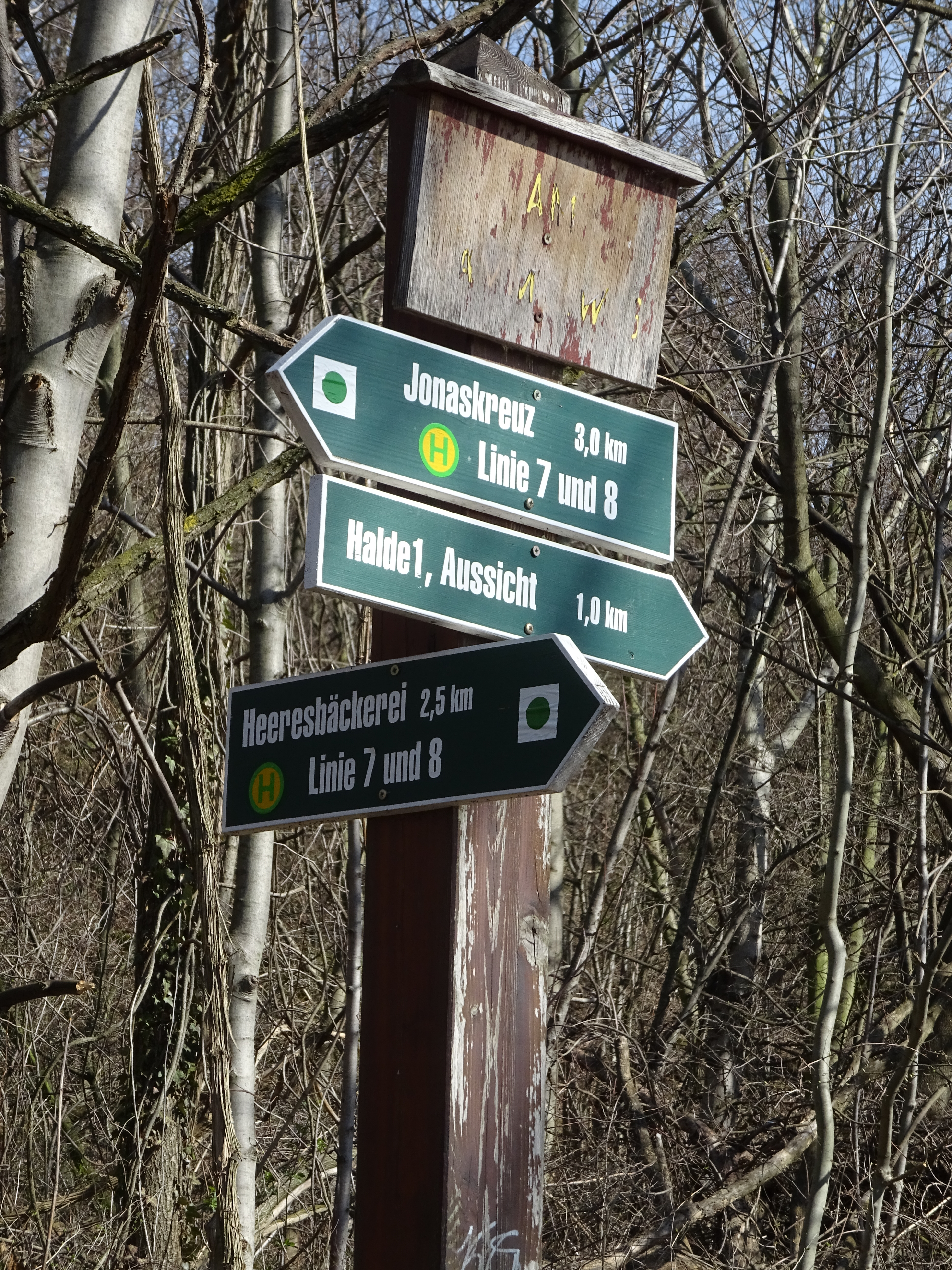 Hellerberge, Hellersiedlung am 16. März 2019, Wegweise amTrümmerberg. Hier lagern ca. 305 der Trümmer von der im Februar bis April 1945 zerstörten Stadt